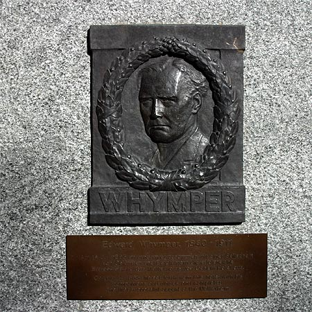 Gedenktafel an Edward Whymper (in Zermatt): " Edward Whymper, 1840-1911 " Am 14. Juli 1865 unternahm er zusammen mit einer Seilschaft von Gefährten und Bergführern die erfolgreiche Erstbesteigung es Matterhorns von diesem Hotel aus. " On July 14, 1865, he set forth from this hotel with his companions and guides and completed the first successful ascent of the Matterhorn.